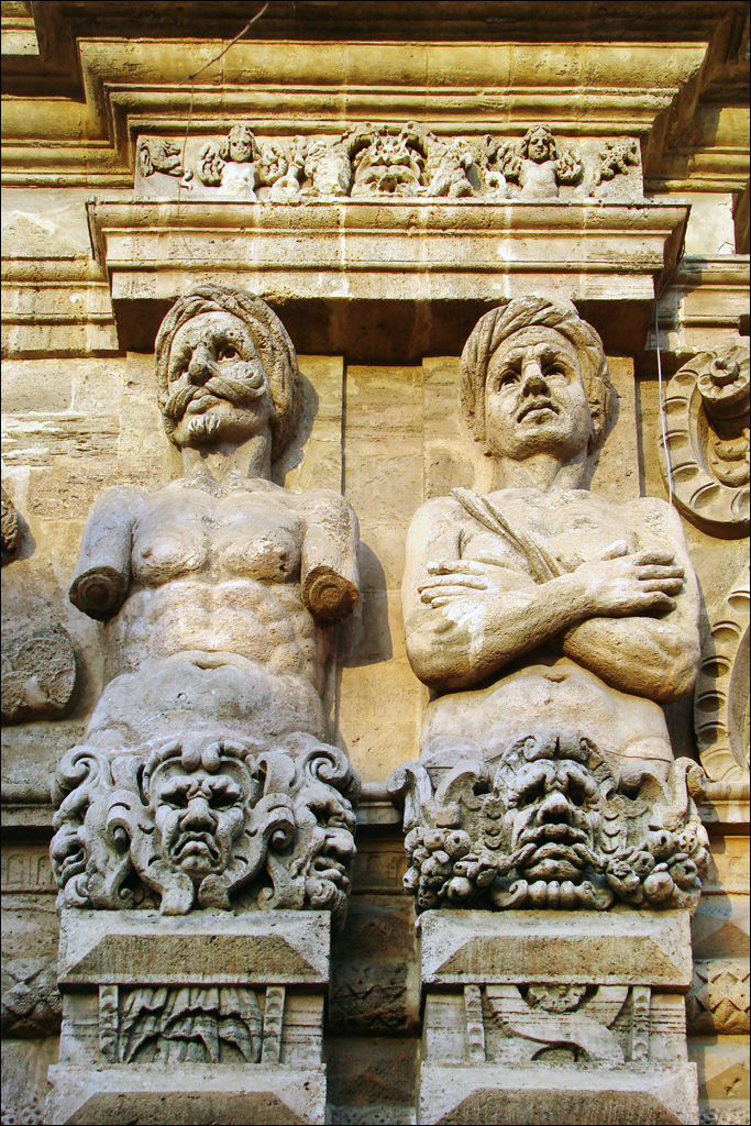 Bustes de maures sur la façade sud de la Porta Nuova Cette porte, la plus importante de l'ancienne Palerme, a été construite sous Charles Quint. Elle est proche du palais des Normands et s'ouvre sur le Corso Vittorio Emanuele. La Porte Neuve, a été mise en service en 1583. Elle commémore la victoire de Charles V sur l'armée turque, c'est pourquoi des Maures y sont représentés. Article de Wikipedia sur la Porte Neuve